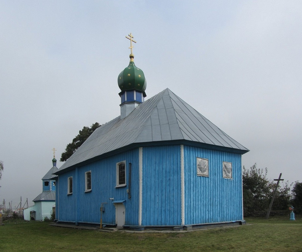 Войская. Царква